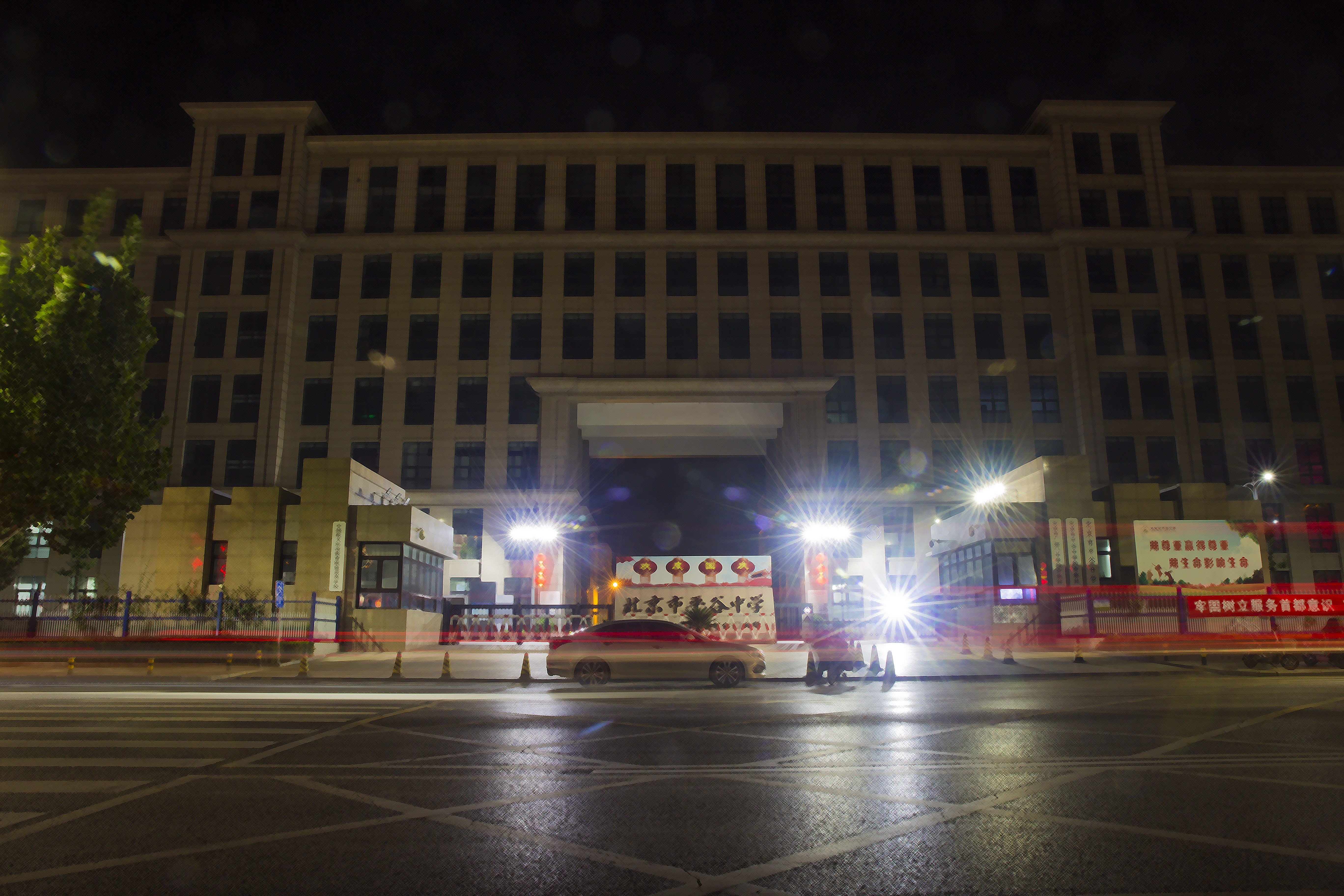 中文（中国大陆）: 北京市平谷中学的夜景